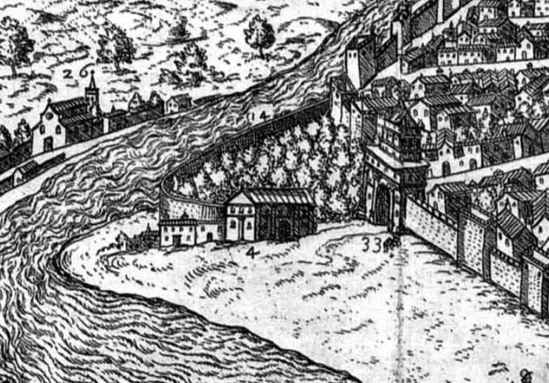 Casa-palacio de Hernando Colón en el barrio de los Humeros, frente a la puerta Real. Sevilla, Andalucía, España.